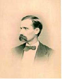 Geólogo Norte-americano